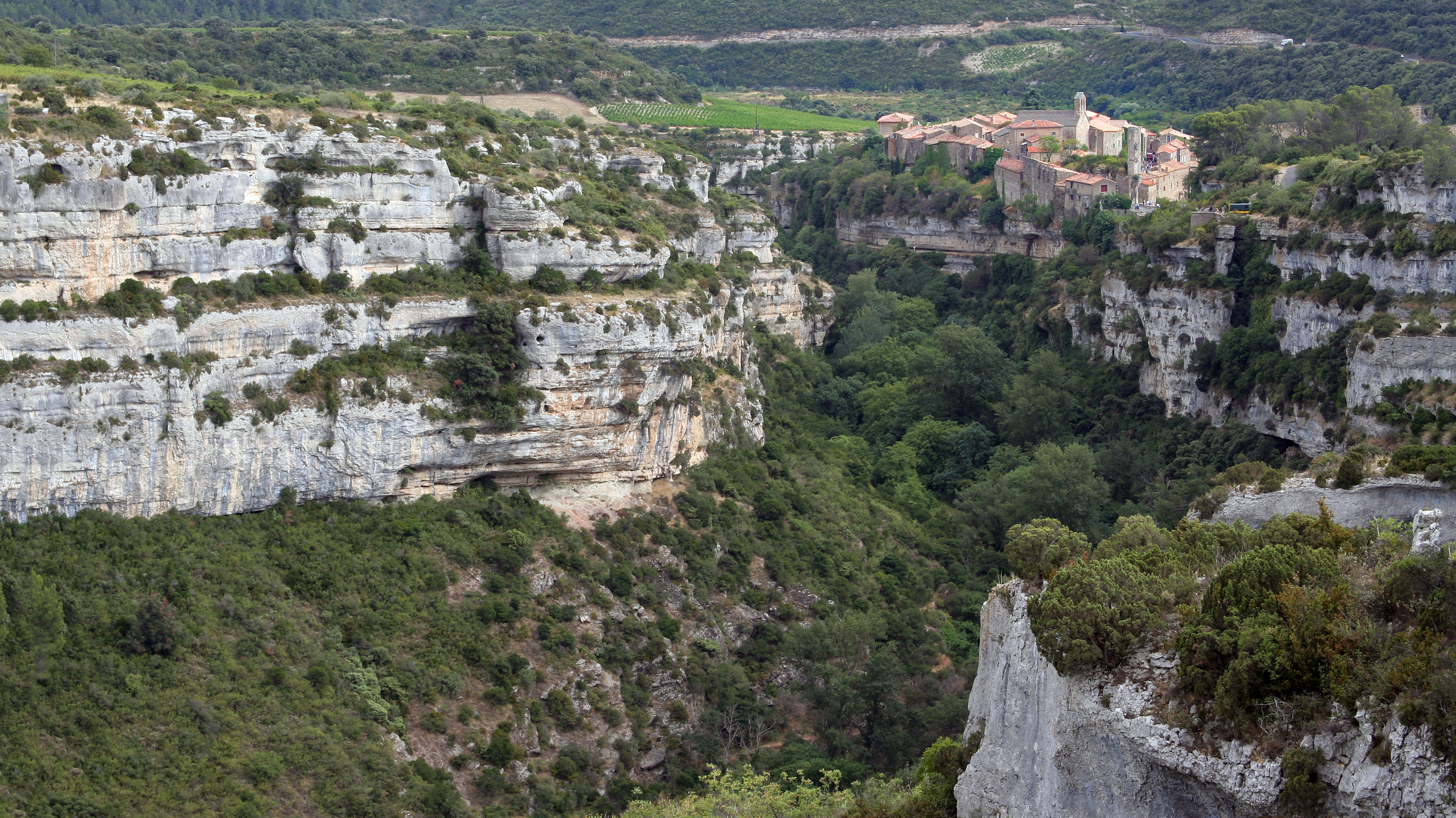 Vue du nord